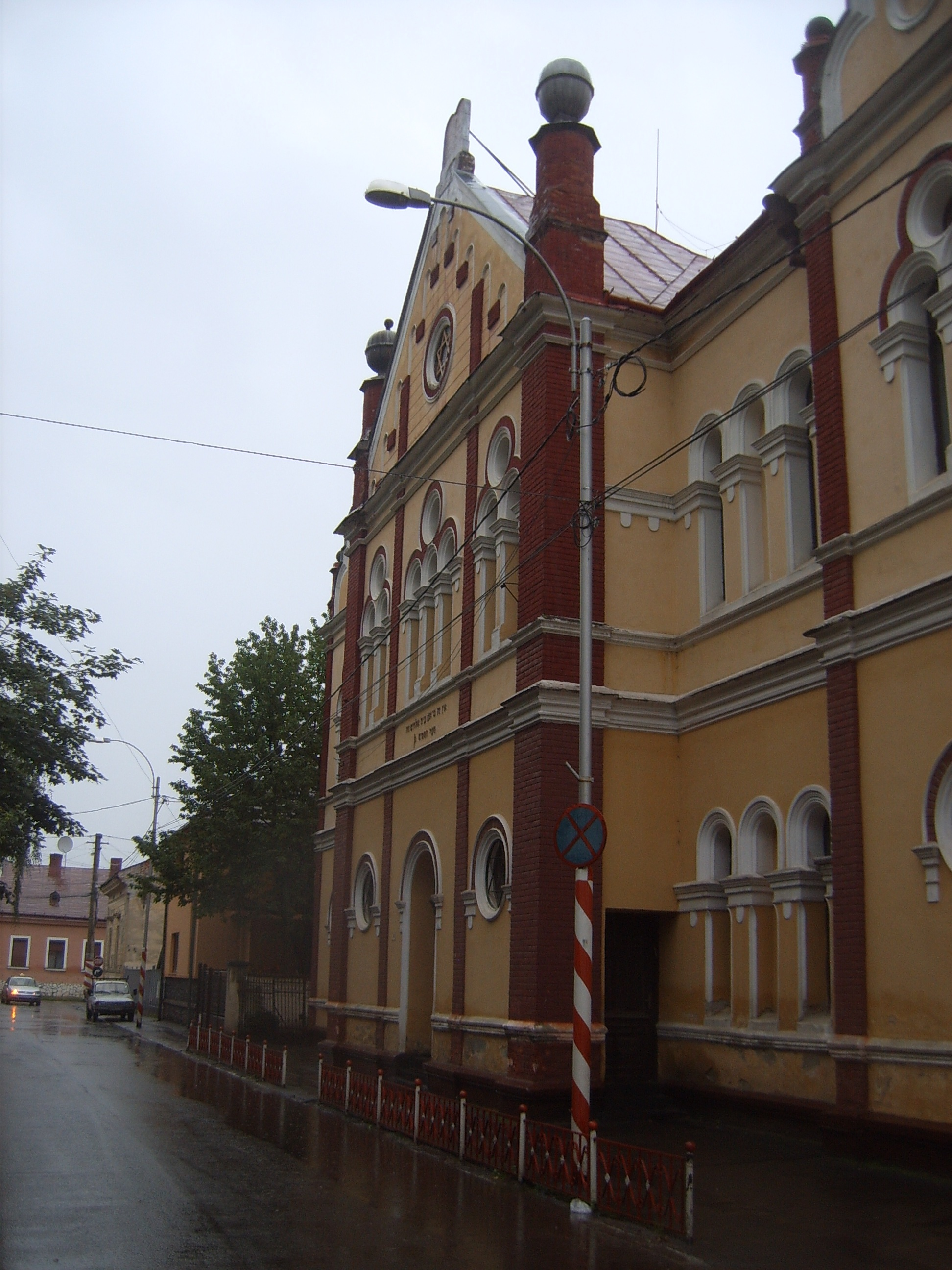 Synagogue à Sighet, Roumanie